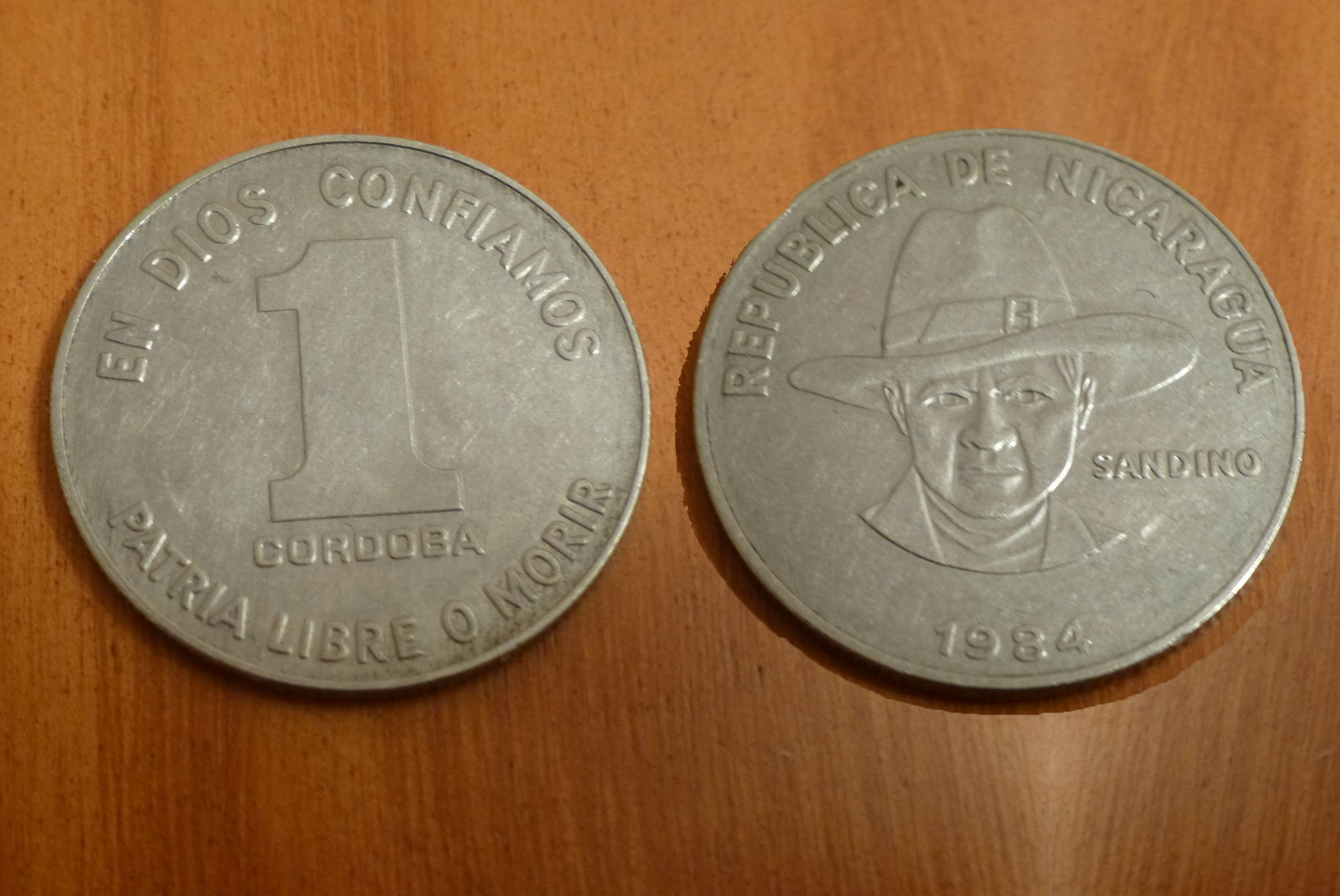 Moneda de 1 córdoba del año 1984. En la cara la esfinge de Sandino, en la cruz el valor monetario con las leyendas "en Dios confiamos" y "Patria libre o morir".